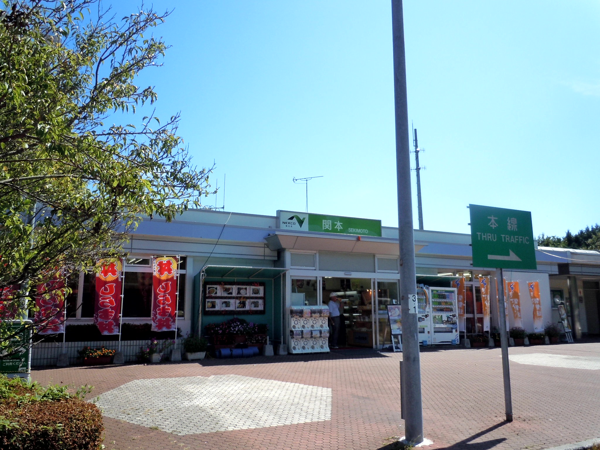 常磐自動車道 関本パーキングエリア（上り線）